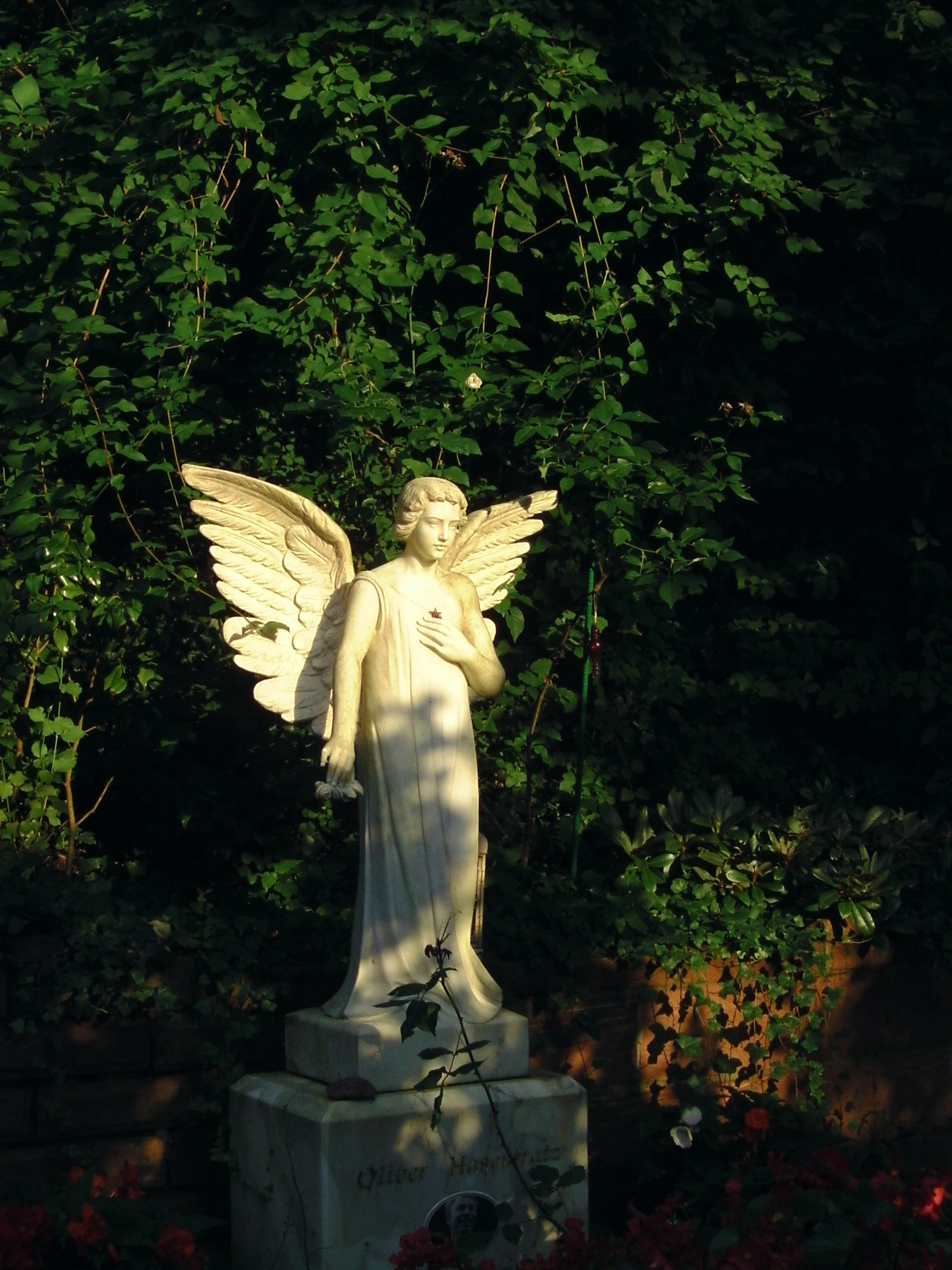 Schutzengel von Oliver Hasenfratz auf seinem Grab auf dem Heidelberger Bergfriedhof